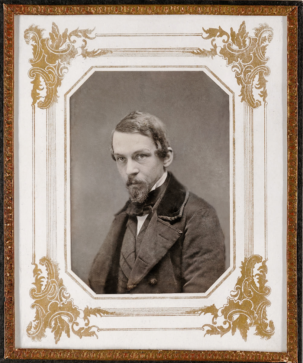 Carl Heinrich Oscar Fielitz (* 9. April 1824; † 28. Mai 1859 in Braunschweig), einziger Sohn von Heinrich August Fielitz (* 28. April 1797 in Luckau; † 25. August 1873 in Neustadt unter der Harzburg) und Charlotte Therese, geb. Elstner (* 10. März 1796; † 12. Juni 1866 in Braunschweig).Daguerreotypie. Bildmaß: Höhe: 9,60 cm; Breite: 6,80 cm, Gesamt: Höhe: 15,60 cm; Breite: 13,00 cm (Museum für Kunst und Gewerbe Hamburg)